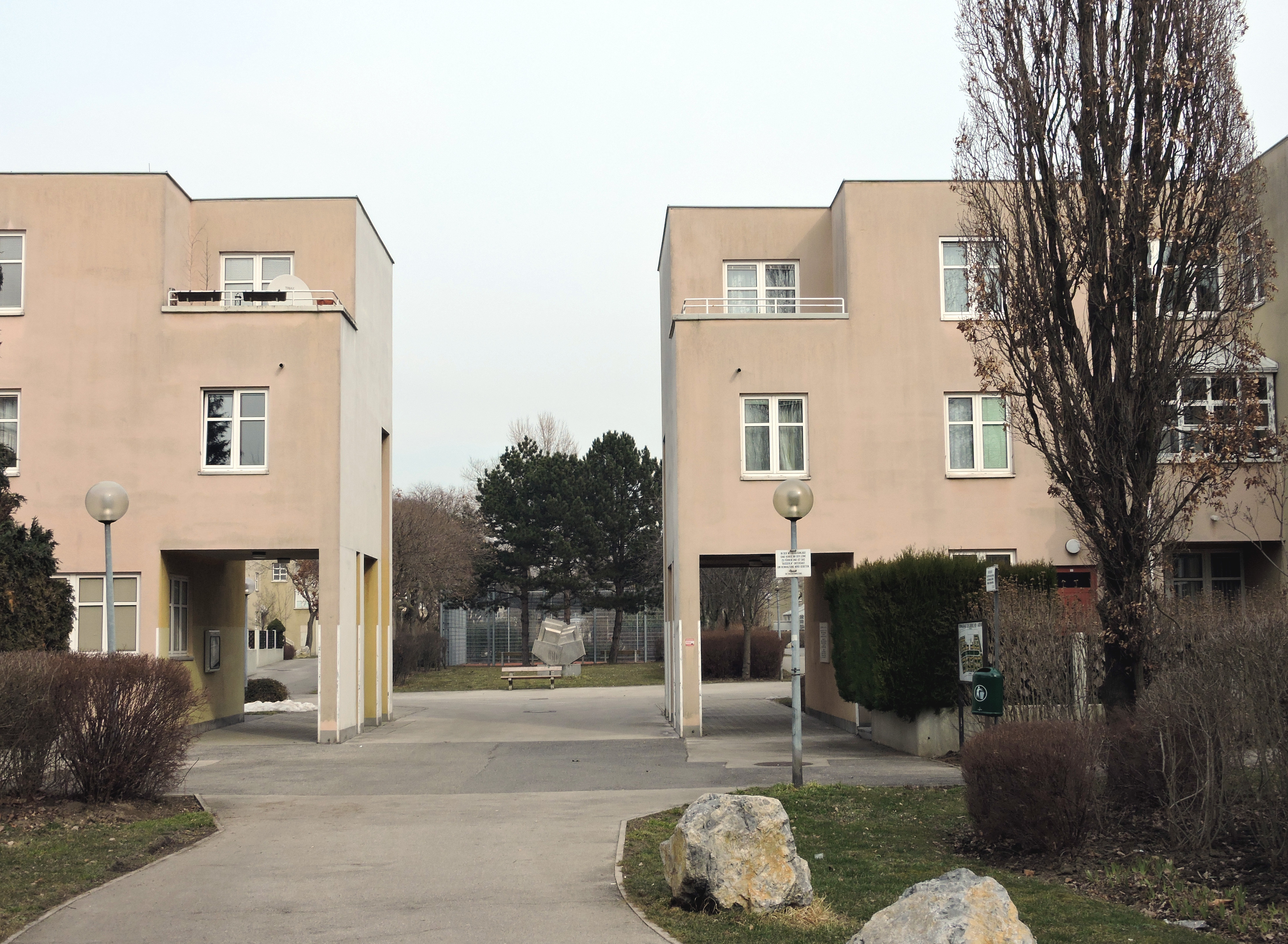 Gemeindebau in der Gerasdorfer Strasse, Wien 21.